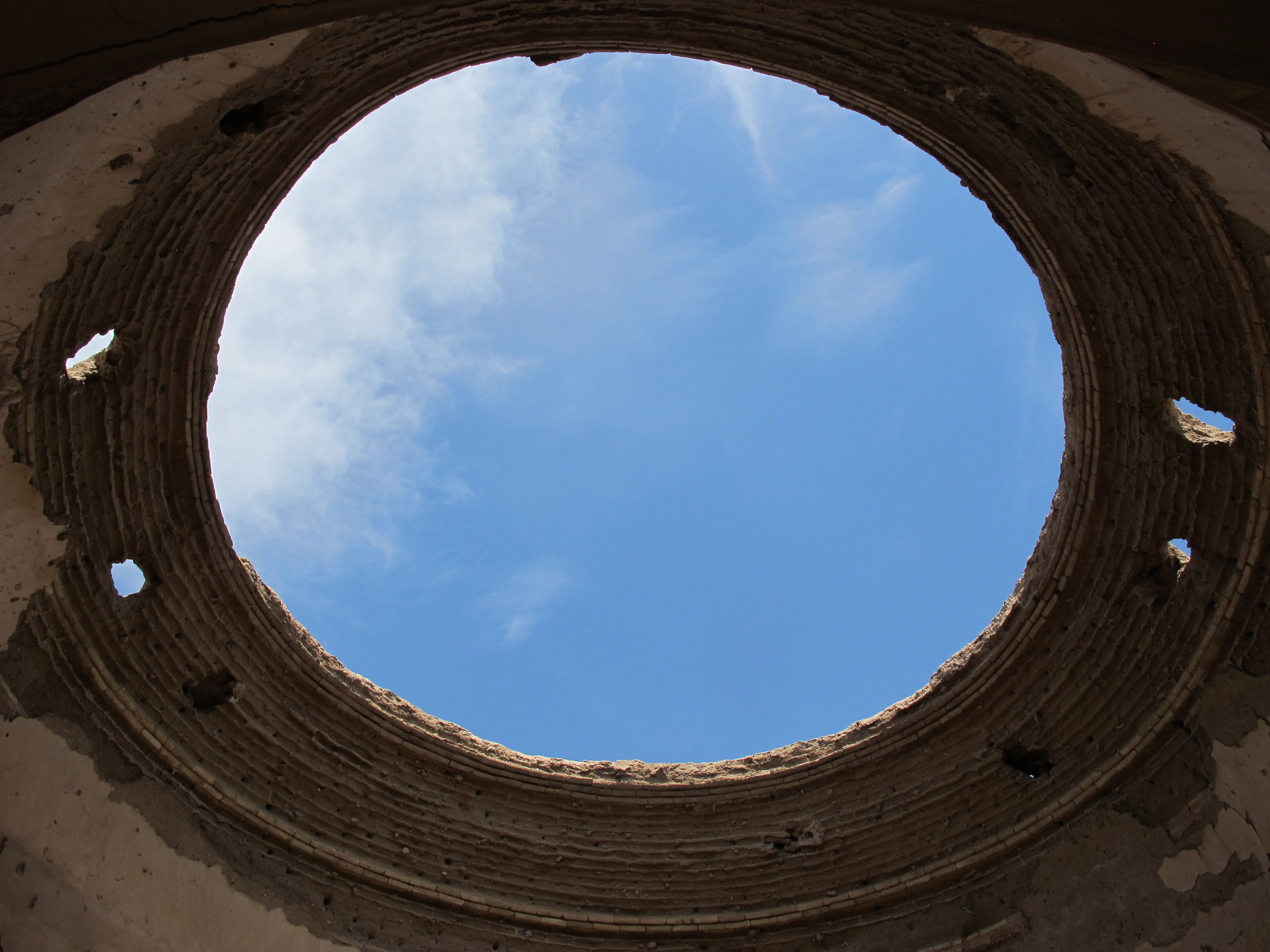 تصویری از عمارت شاسوسا توسط عباس رسول زاده بیدگلی گرفته شده است